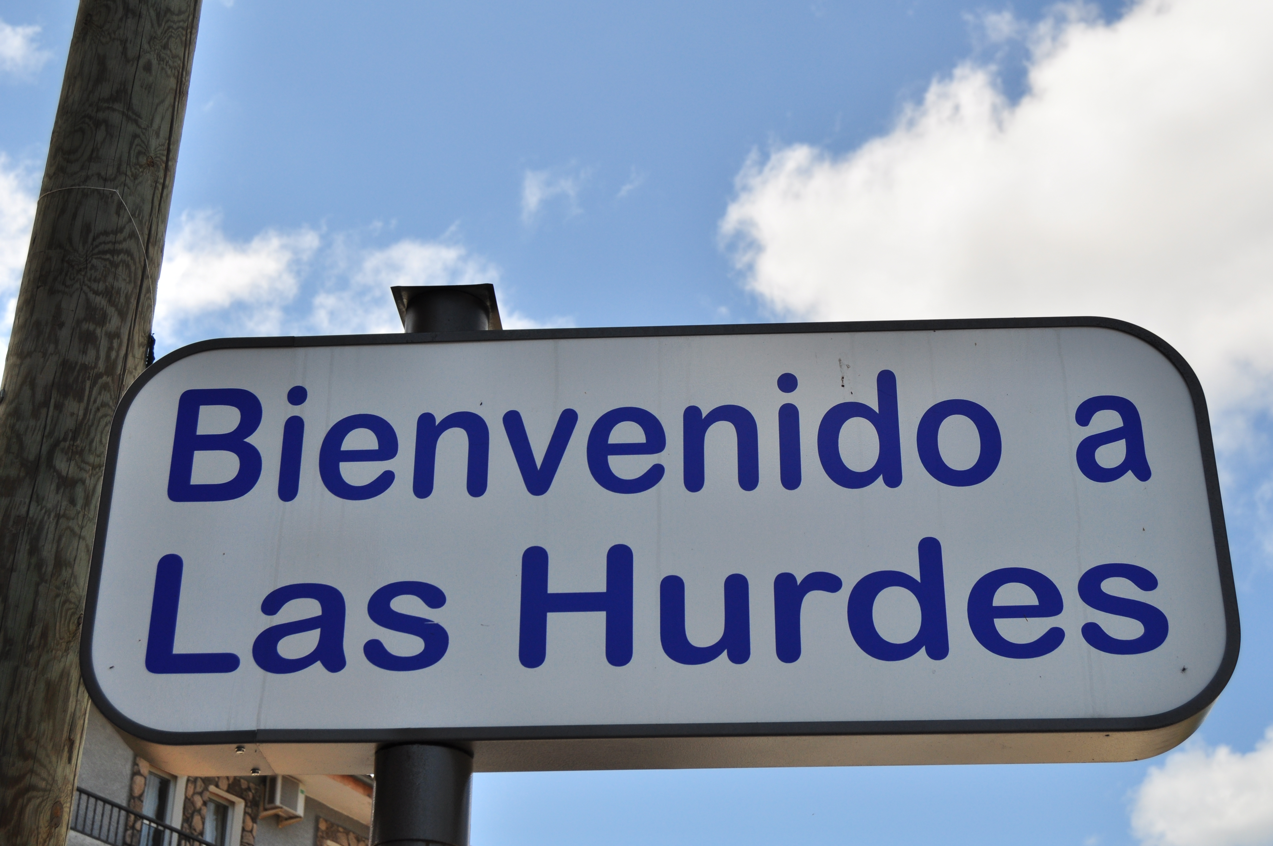 Riomalo de Abajo (Caminomorisco) - 001